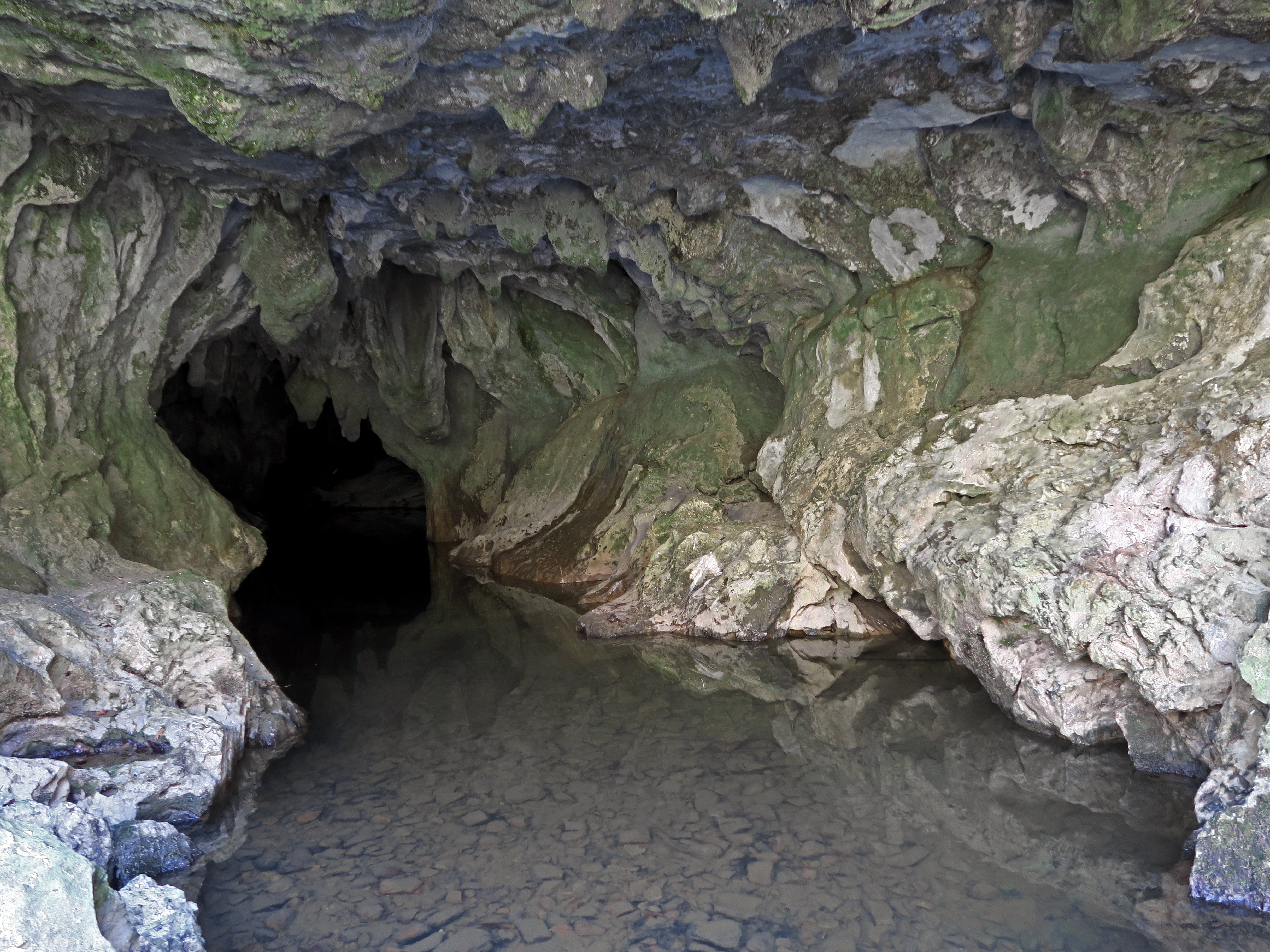 Montesquieu-Avantès (Ariège, France) - Entrée de la grotte du Tuc d'Audoubert.